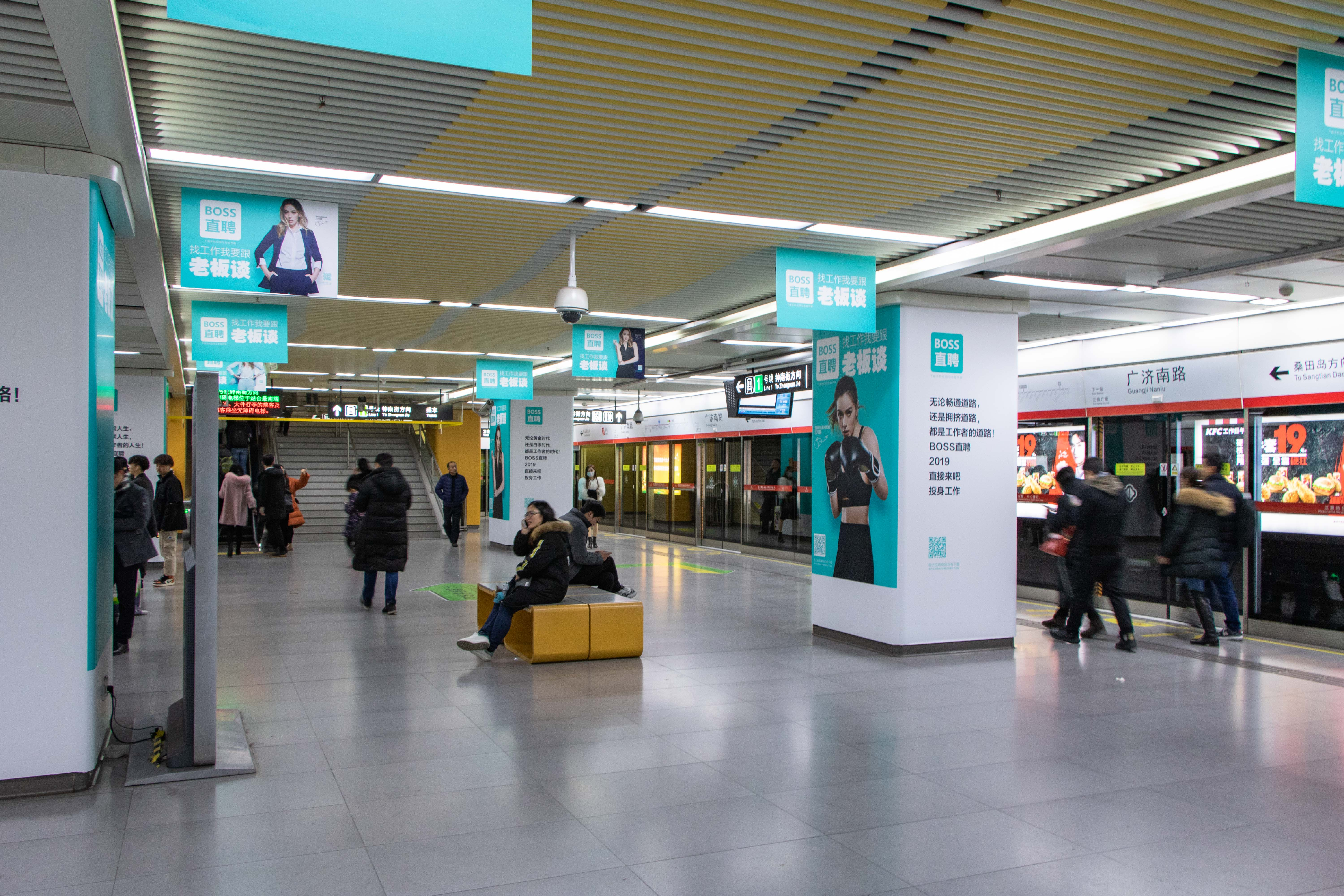 中文（中国大陆）: 广济南路站2号线站台